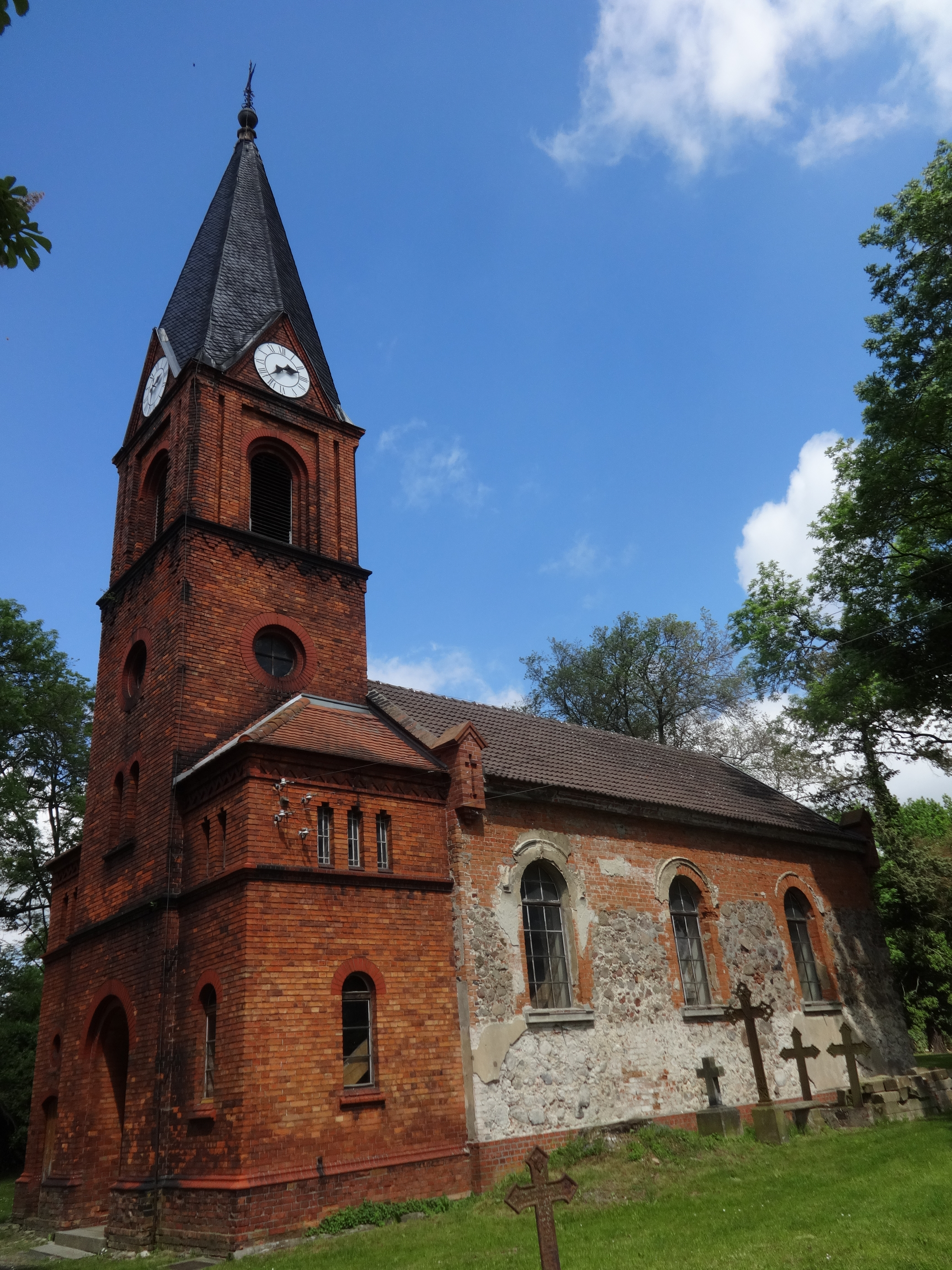 Die Dorfkirche ist ein romanisierter Backsteinbau, der vermutlich im 16. oder 17. Jahrhundert entstand. 1779 kam der Westturm hinzu; 1905 erfolgte eine Sanierung des Bauwerks. Im Innern befindet sich unter anderem eine Sauer-Orgel.